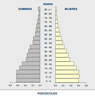 Pirámide de la población del Cantón La Mana, en la provincia de Cotopaxi, Ecuador.